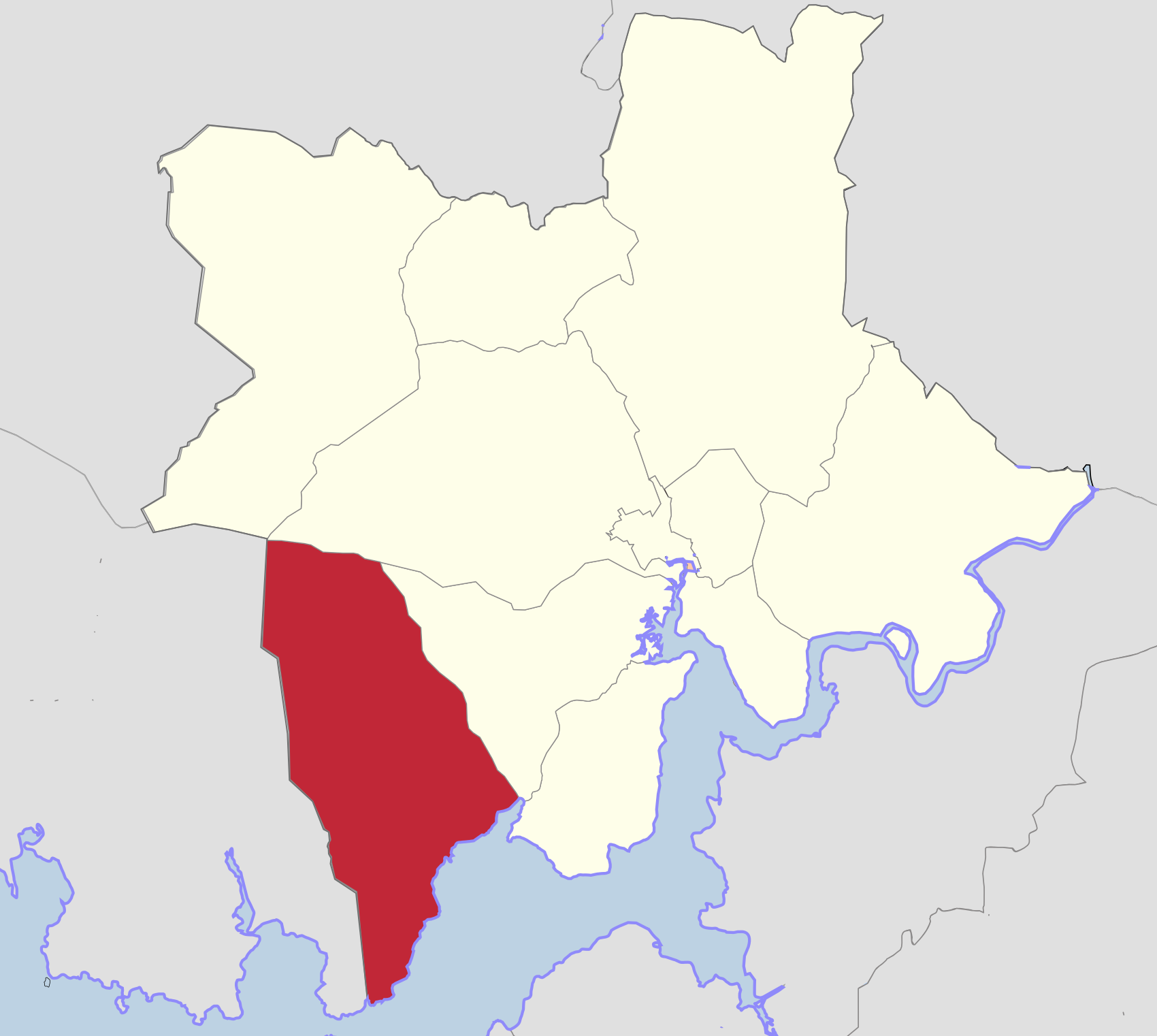 Extensión de la pqrroquia de Freixo de Sabardes en Outes